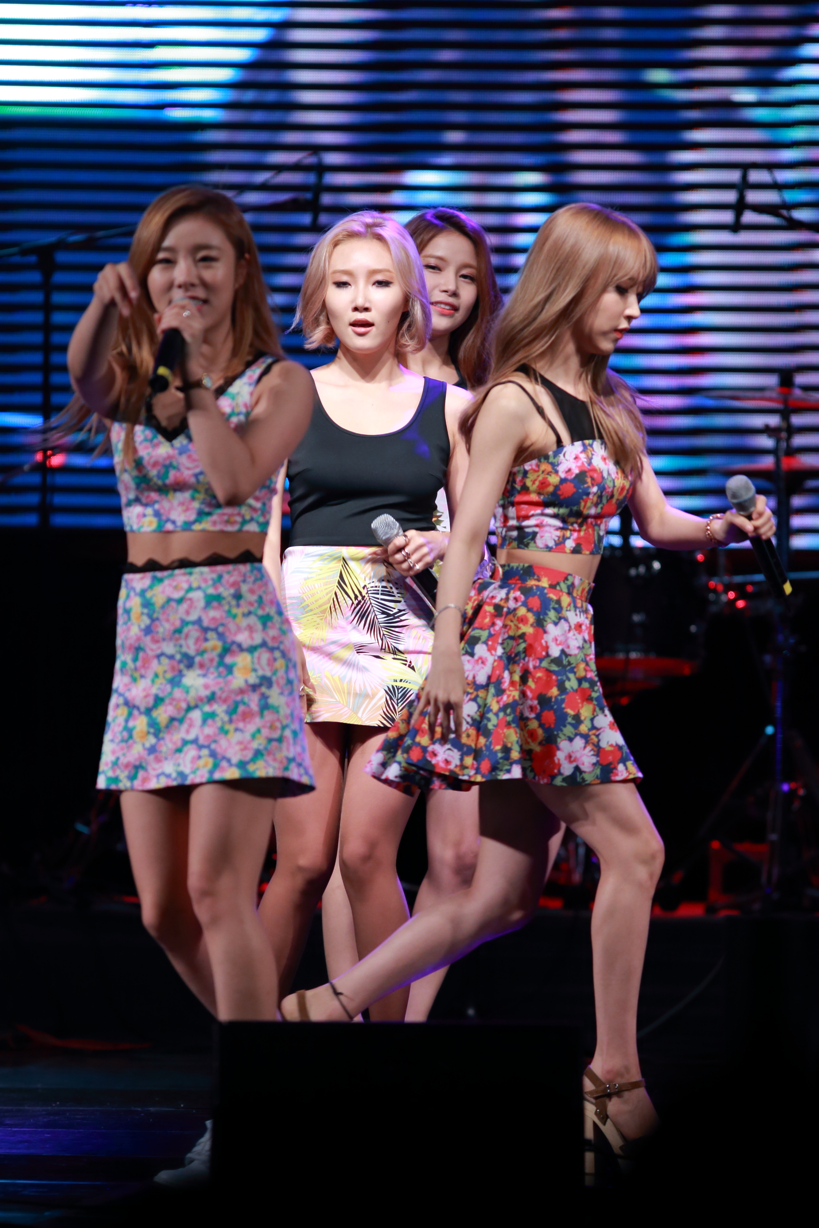 150829. 평택전국밴드경연대회. 마마무.